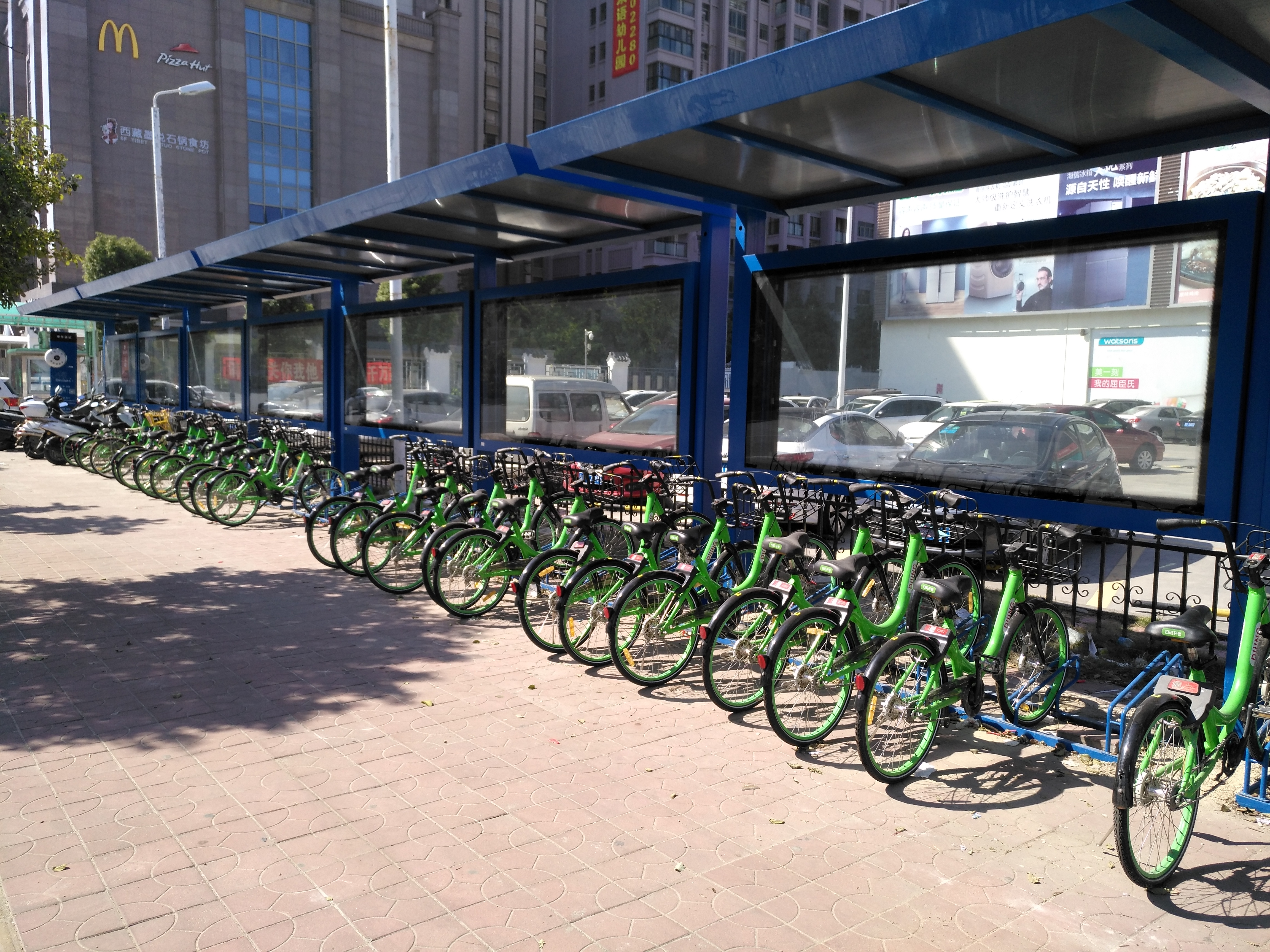 位于广东省汕头市澄海区福昆线卜蜂莲花的一处叮嗒出行单车停放点。